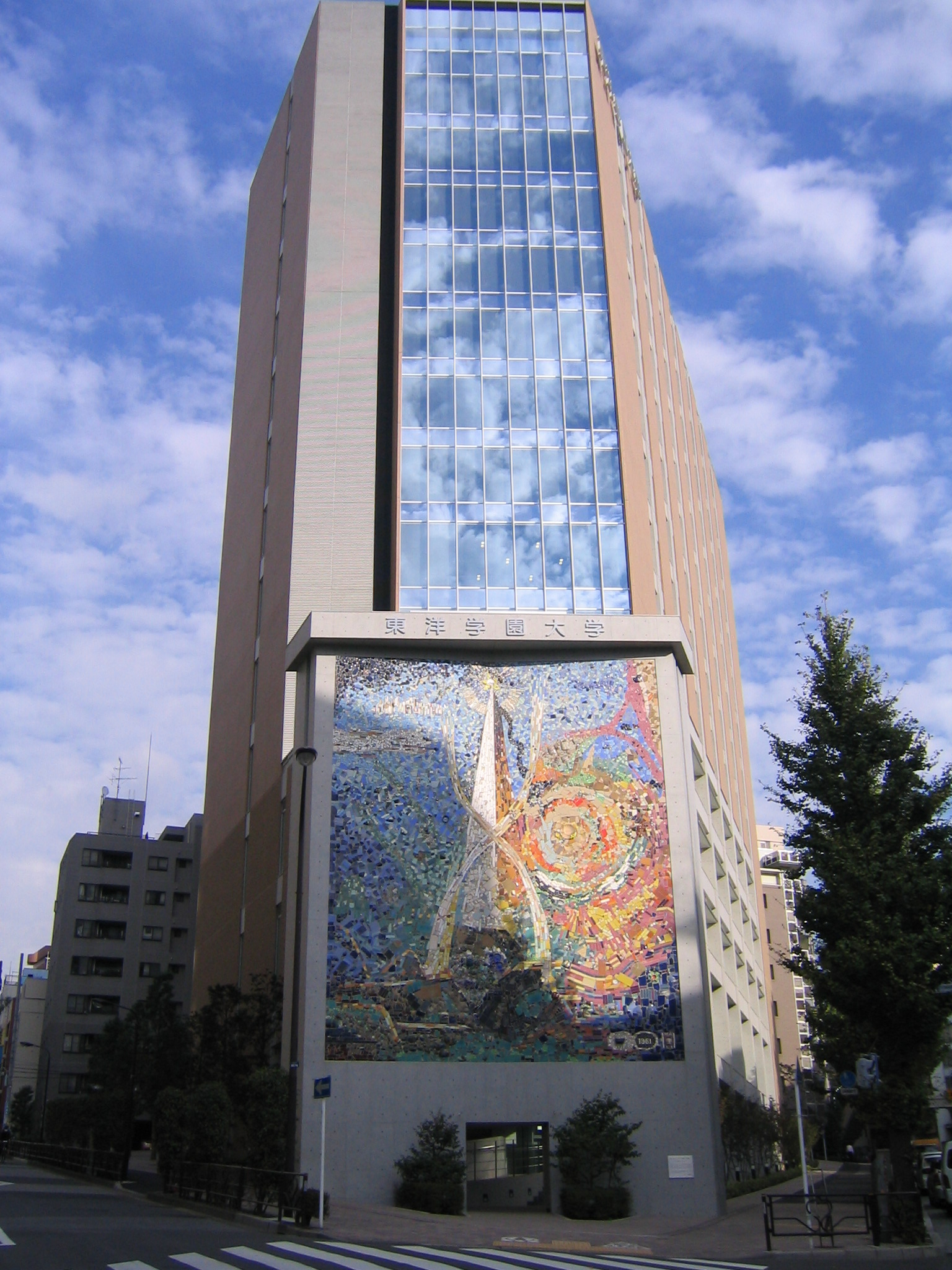 東洋学園本郷キャンパス壁画